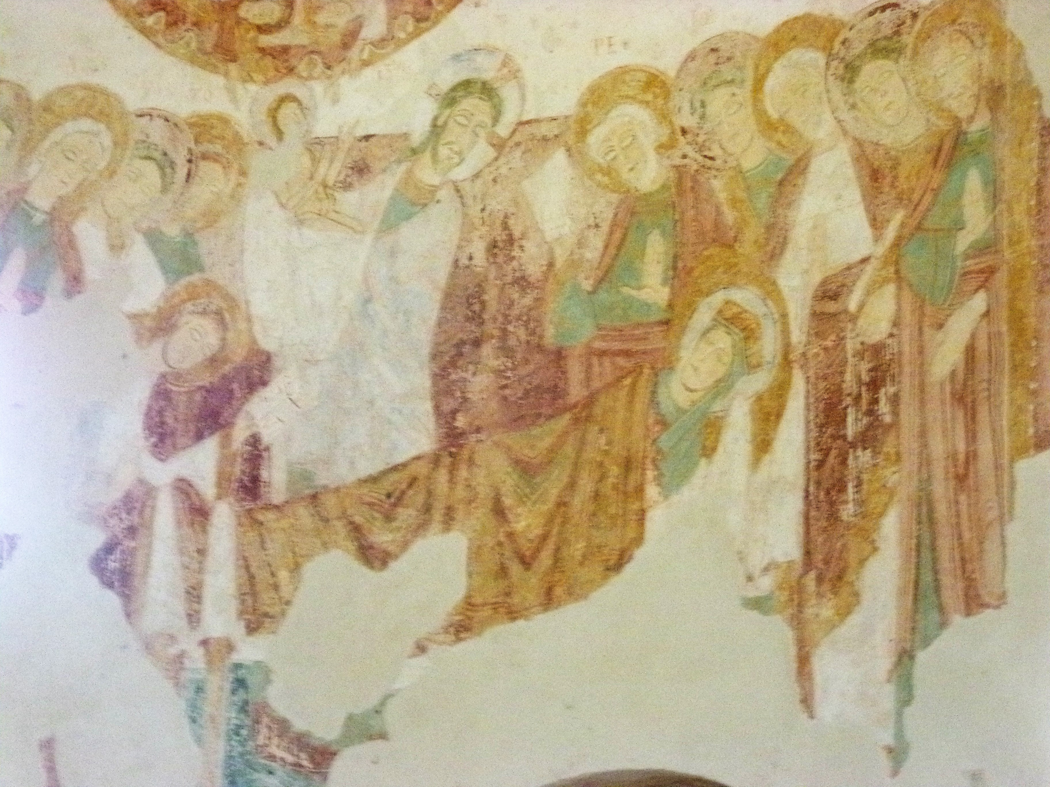 Fresque "Dormition de la Vierge